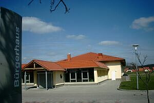 Buergerhaus Guenthersleben